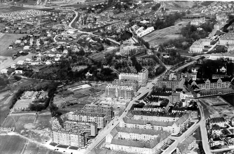 Marienlyst, Kirkeveien, Fagerborggata, Vestre Aker kirke, Ullevål hageby, Ullevål sykehus